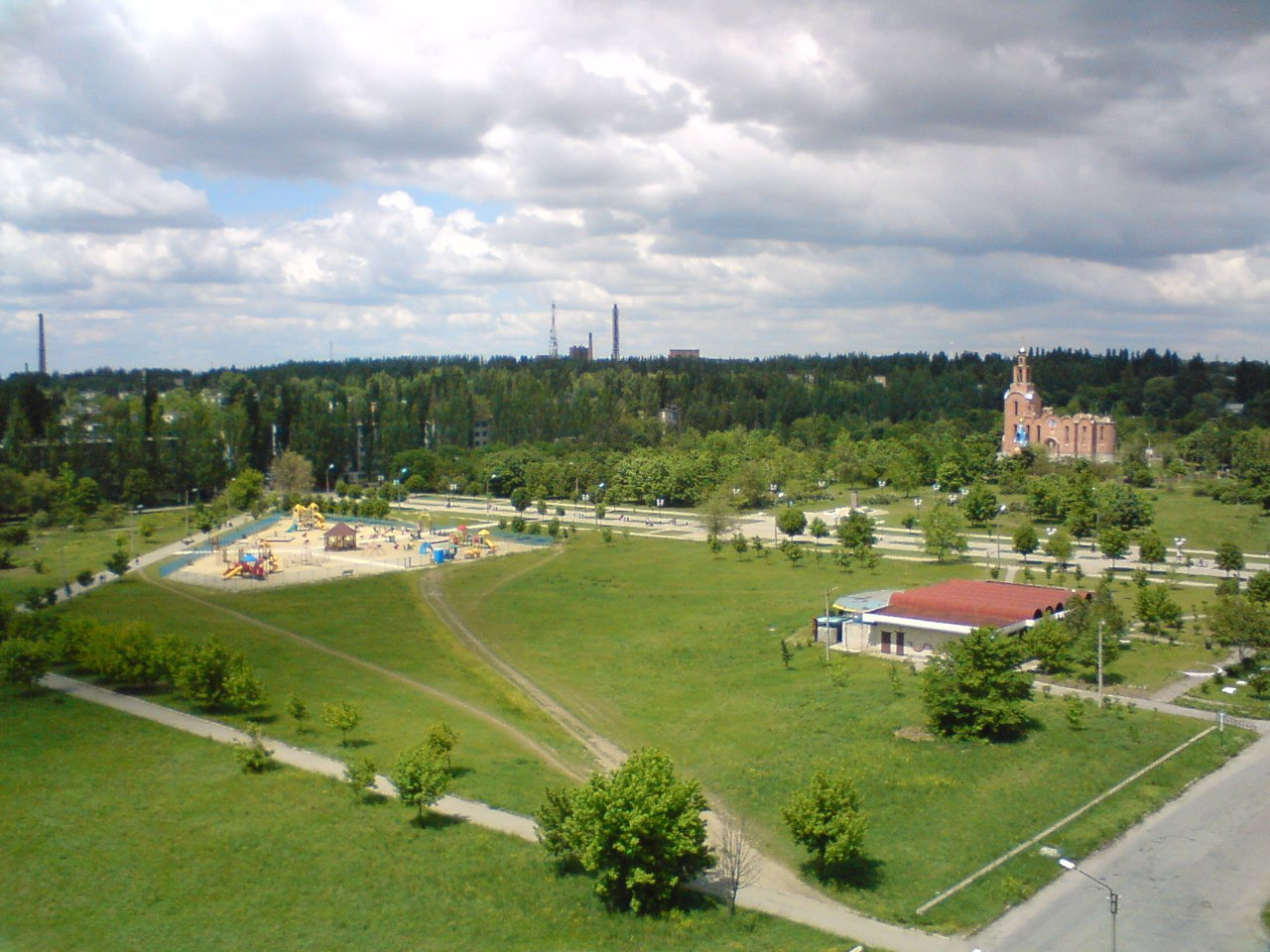 м. Покров, вид на дитячий майданчик